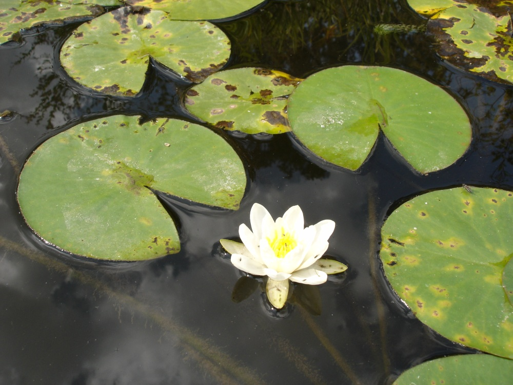 Nymphaea alba, septembre 2004